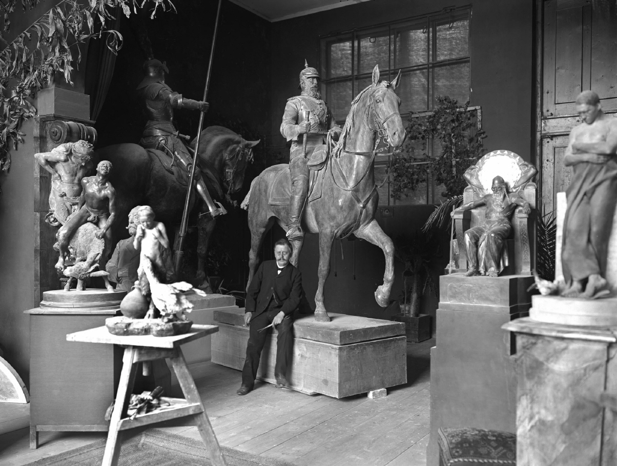 Rudolf Maison in seinem Atelier in München-Gern, Tizianstraße 16. von links nach rechts: 1. Karyatide/Atlas (?) 2. Neger auf einem Esel reitend, 1893 3. Büste von (?) 4. Knabe mit Gans (?) 5.(dahinter):Ein reitender Landsknecht für Bremen, 1903 (1942 eingeschmolzen) 6. Reiterstandbild Friedrich III, Deutscher Kaiser für das Kaiser-Friedrich-Museum (nach 1945 eingeschmolzen) 7. Wotan auf dem Rabenthron (große Fassung) für Hermann Hendrichs Sagenhalle in Schreiberhau (Verbleib?) 8. ???